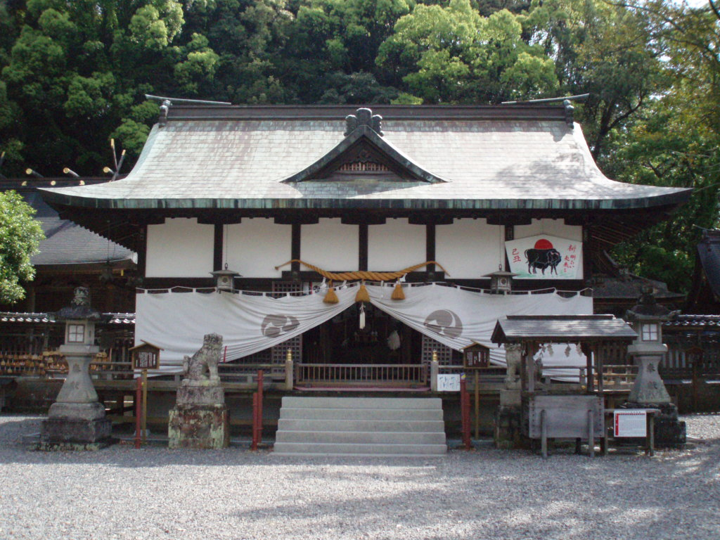 闘鶏神社拝殿